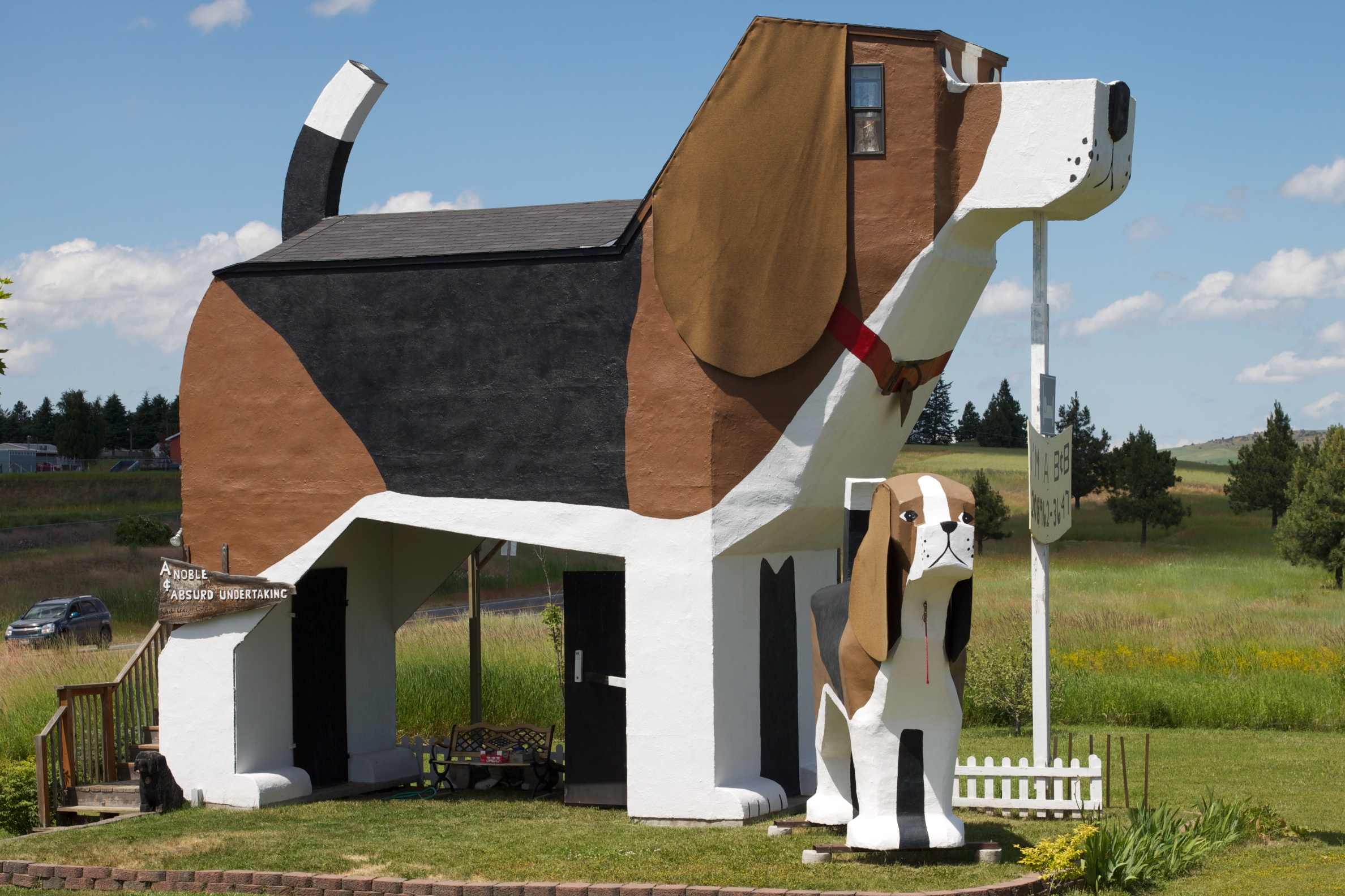 Dog Bark Park, Cottonwood, Idaho